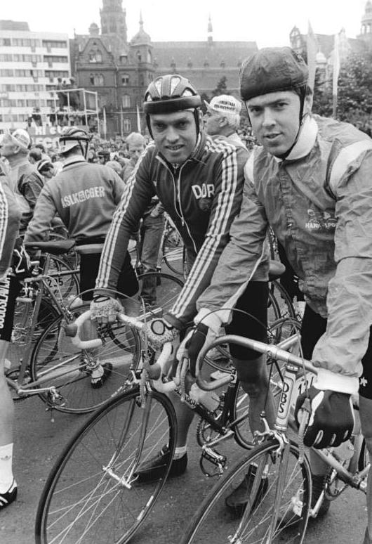 Friedensfahrt, Olaf Ludwig, Olaf Lurvik ADN-ZB Kasper 21.5.87 Polen: 40. Internationale Friedensfahrt-12. Etappe von Legnica nach Wroclaw über 180 km- Zweimal Olaf, zweimal großartige Fahrer der Jubiläumsfahrt. Vor dem Ehrenstart in Legnica der vorjährige Friedensfahrt-Sieger Olaf Ludwig (DDR-links) und Norweger Olaf Lurvik.